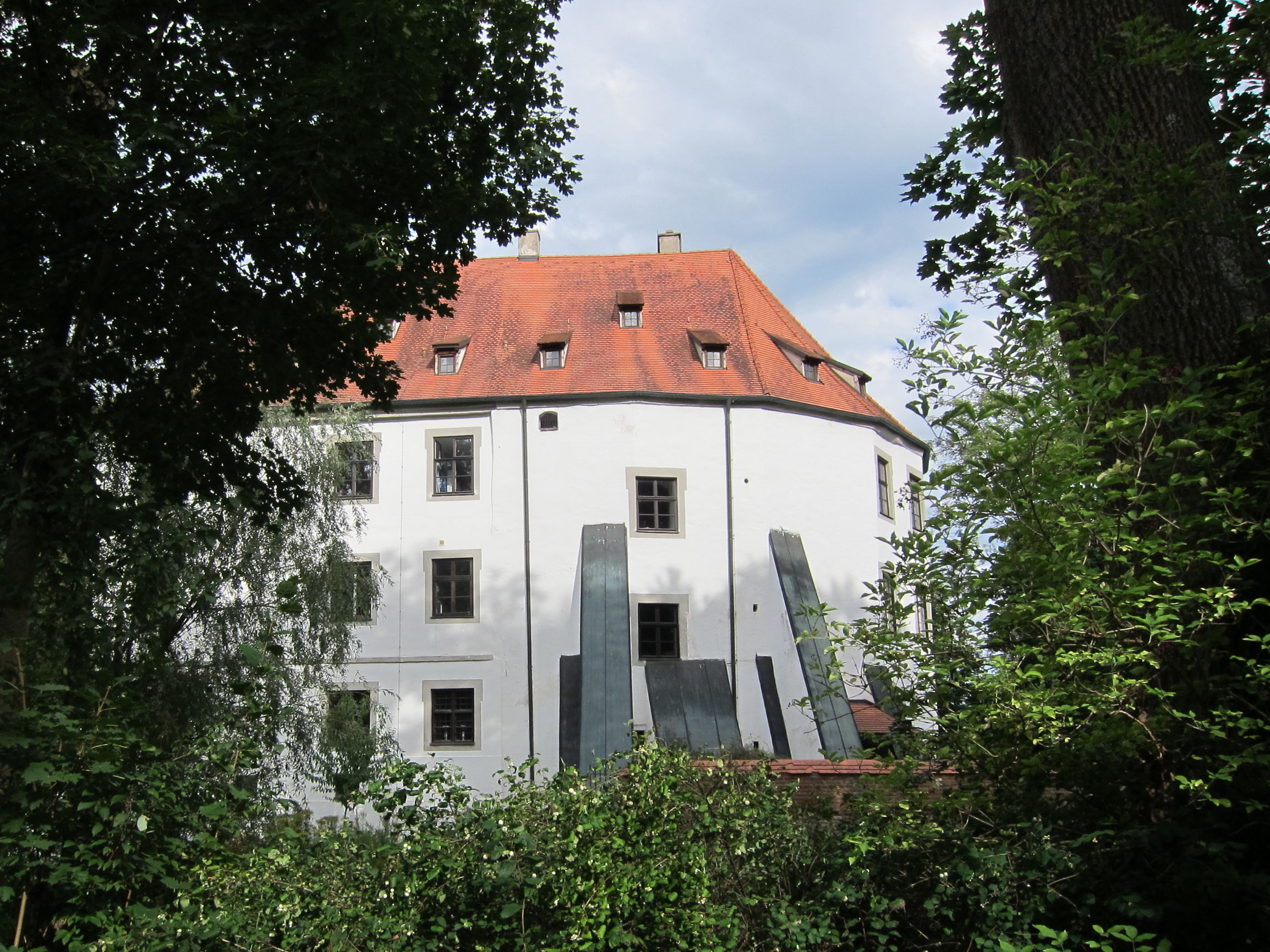 Fraunberg, Erdinger Str. 16; Schloss Altfraunberg, dreigeschossiges Wasserschloss mit Walmdach und Krangaube, im Kern mittelalterlich, 1683 wesentlich neu erbaut; Schlossgraben mittelalterlich; Stützmauern zum Wassergraben hin, 16./17. Jahrhundert.